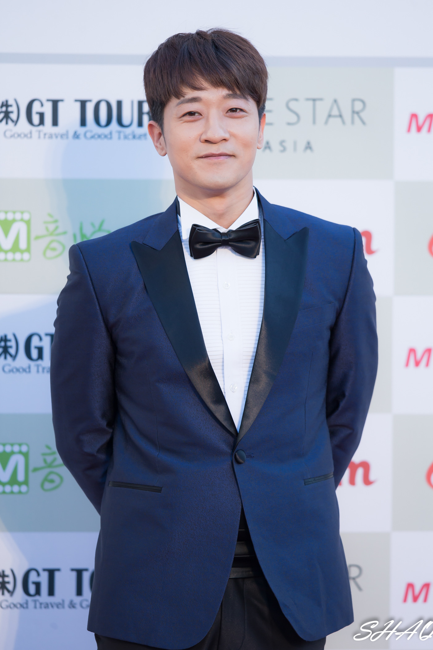 160217 가온차트 K-POP 어워드 레드카펫